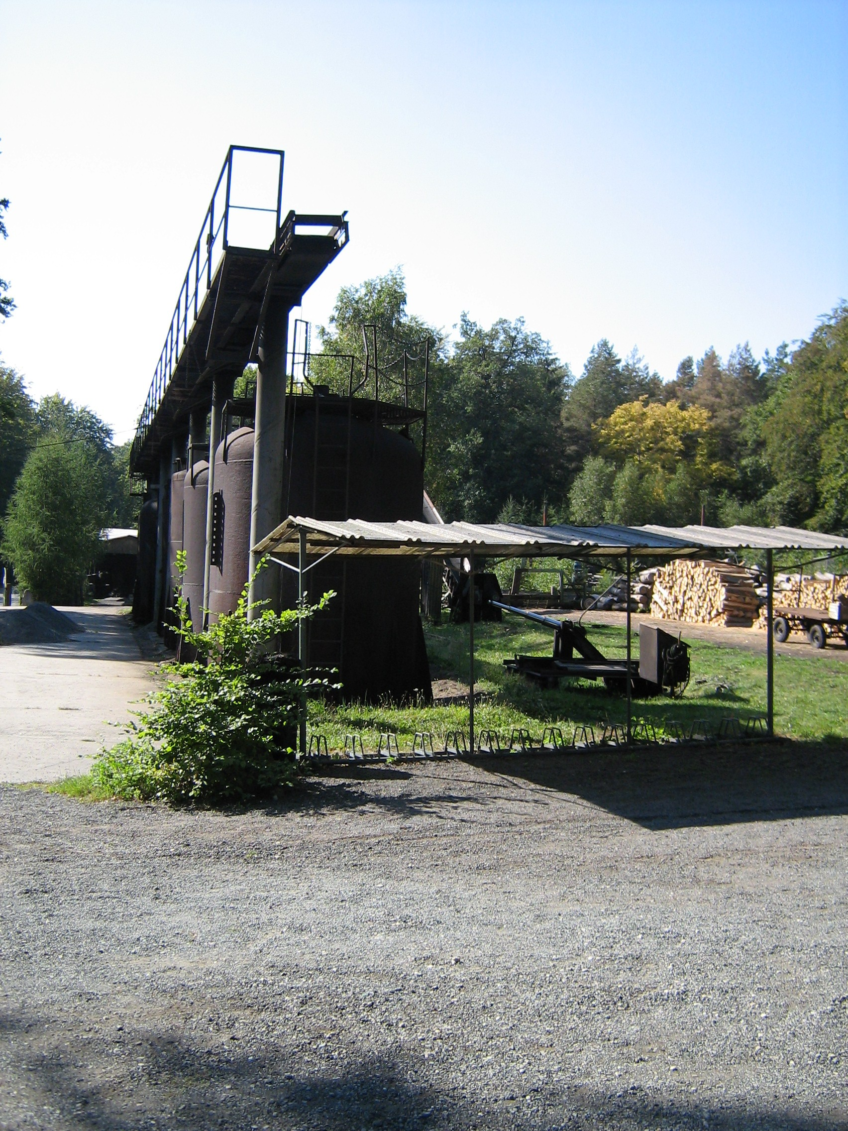 Die Köhlerei Eisenhammer in der Dübener Heide own Work